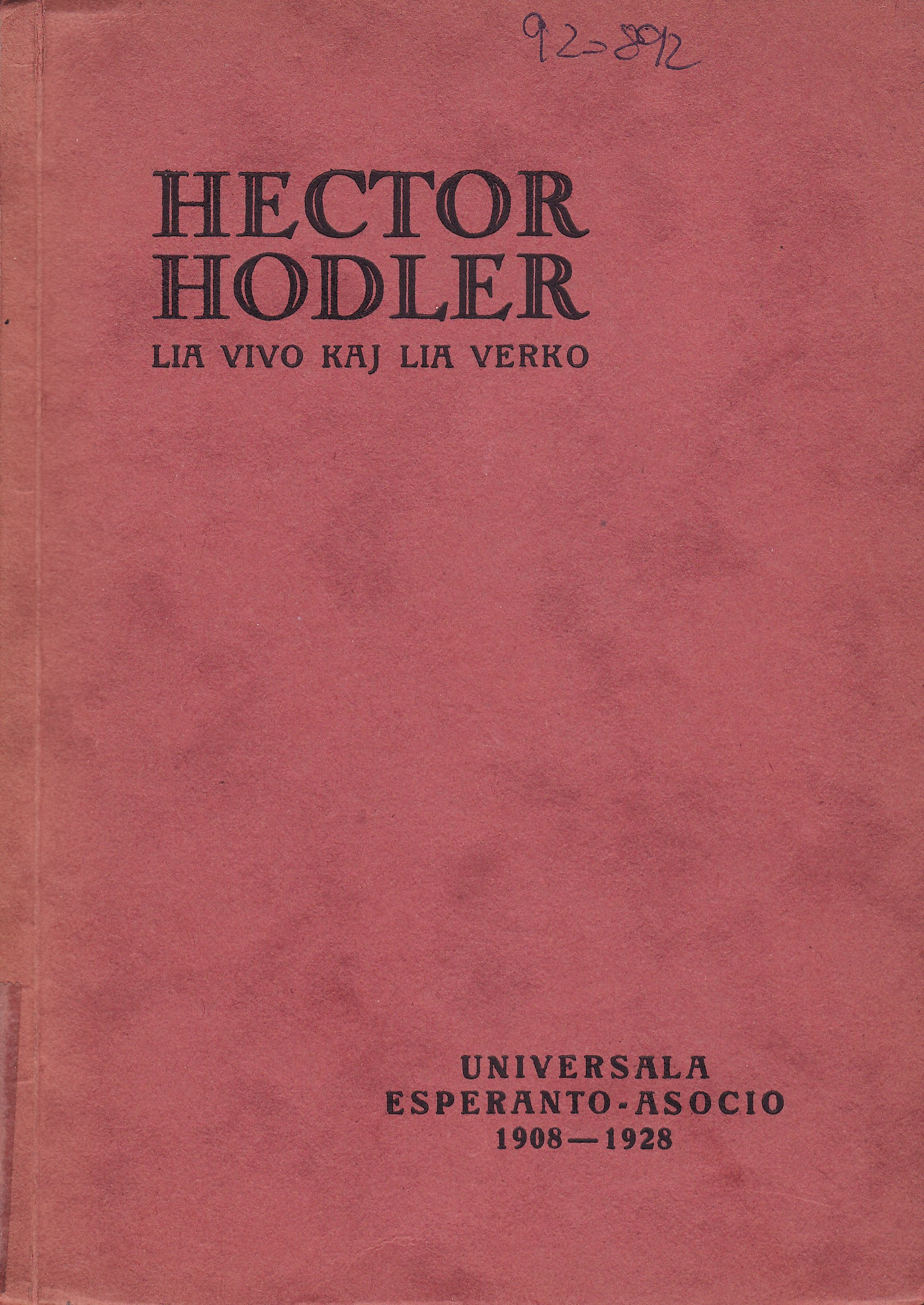 1928 Hector Hodler. Lia vivo kaj lia verko